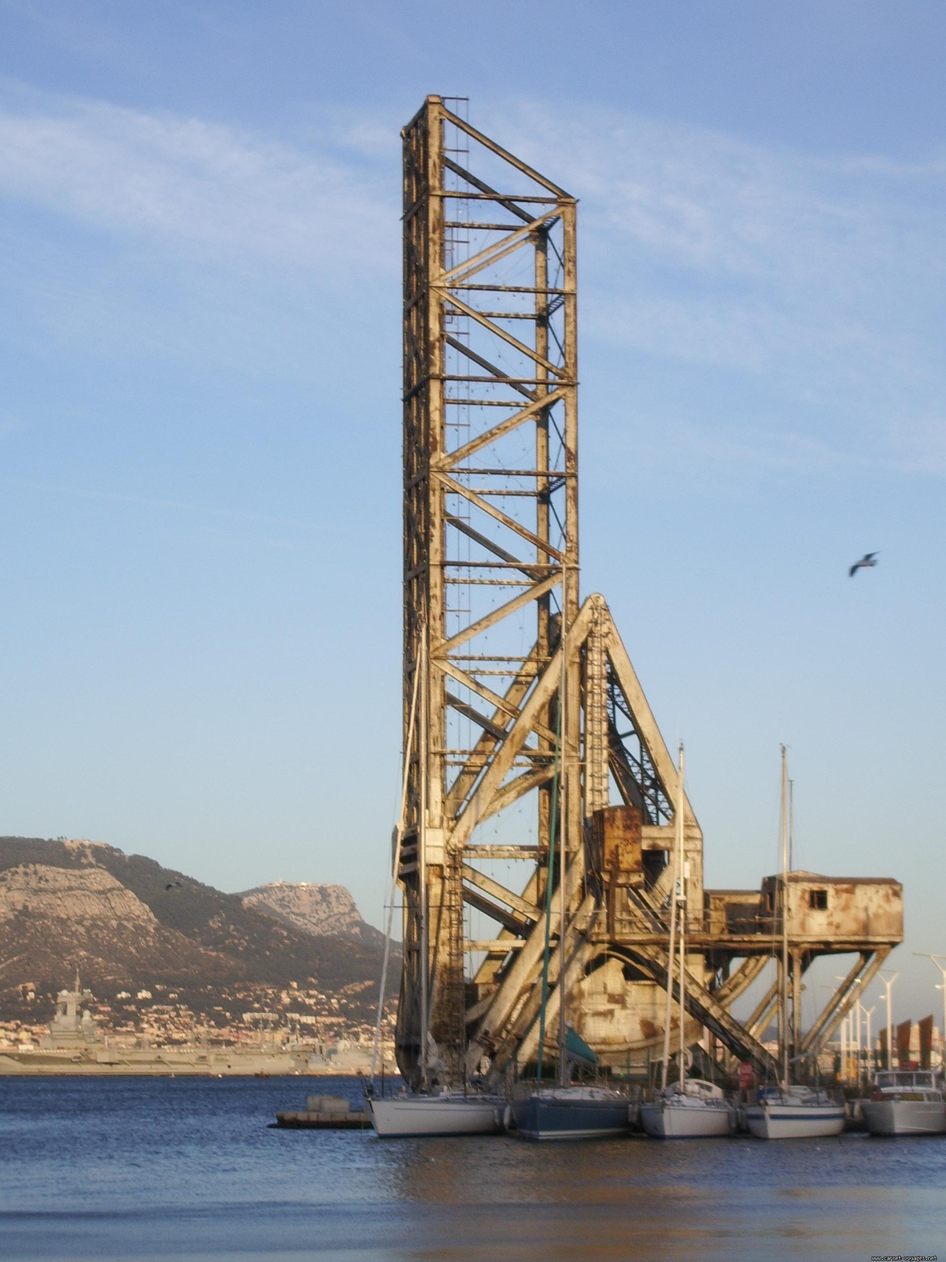 Description: Pont-rail basculant à l'entrée du port de la Seyne-sur-Mer. Il a été réalisé en 1917 par les sociétés Daydé pour les Forges et chantiers de la Méditerranée (FCM). D'une hauteur de 44 mètres, il s'élève devant l'entrée du port de plaisance et est le dernier symbole de la vie des chantiers navals, dont l'arrêt définitif a été prononcé en 1989. Auteur: Juju ( Site